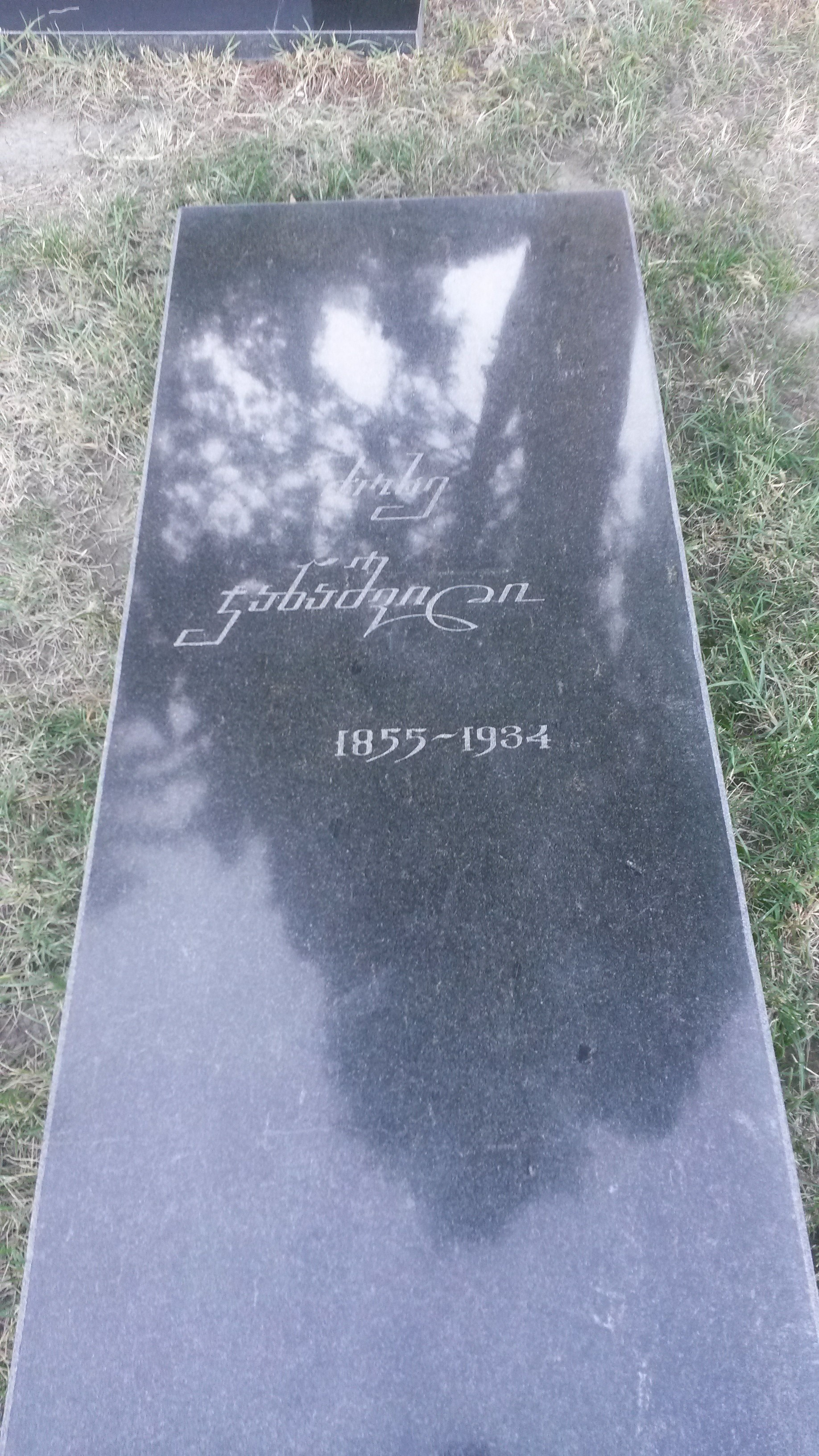 მთაწმინდის პანთეონი